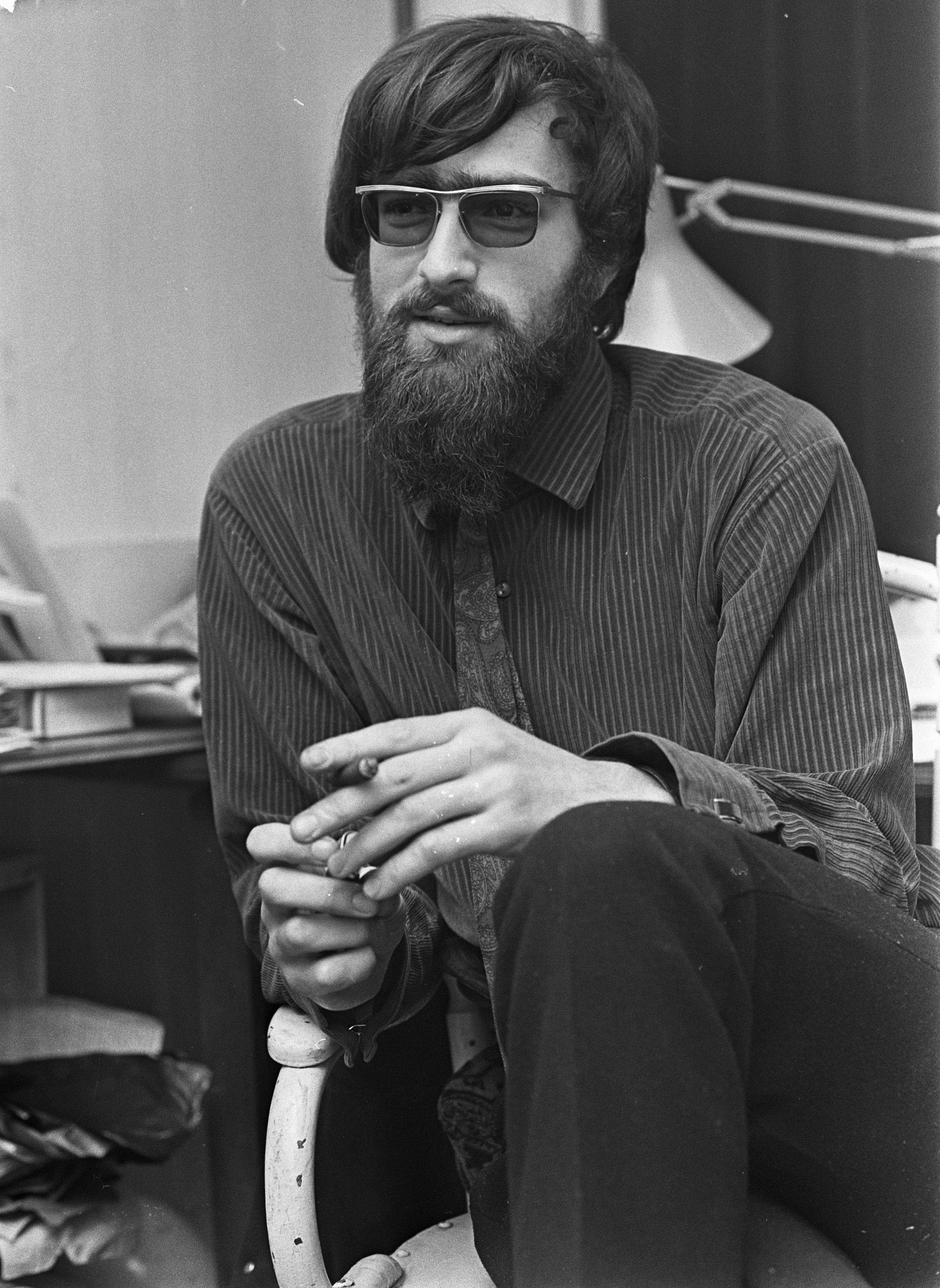 Collectie / Archief : Fotocollectie Anefo Reportage / Serie : [ onbekend ] Beschrijving : Opdracht Gelderlander. Frank Broers (schrijver, pseudoniem J. Vogelaar ) Datum : 26 maart 1968 Trefwoorden : schrijvers Persoonsnaam : J. Vogelaar Fotograaf : Nijs, Jac. de / Anefo Auteursrechthebbende : Nationaal Archief Materiaalsoort : Negatief (zwart/wit) Nummer archiefinventaris : bekijk toegang 2.24.01.05 Bestanddeelnummer : 921-1959